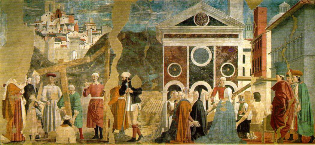 Aus der Heiligenlegende zur Bestimmung des wahren Kreuzes Christi durch die Kaiserin Helena